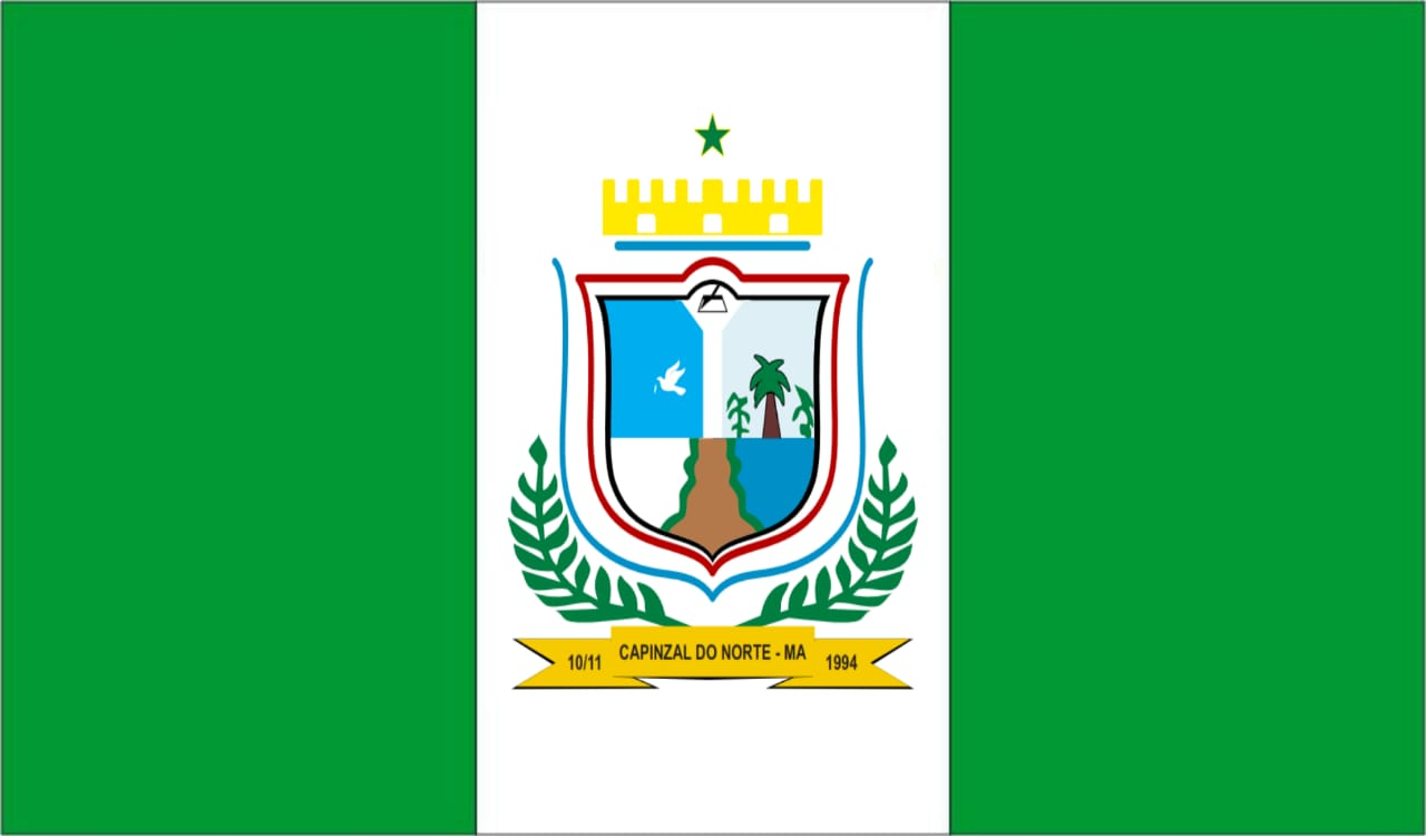 Bandeira do município de Capinzal do Norte MA no estado do Maranhão